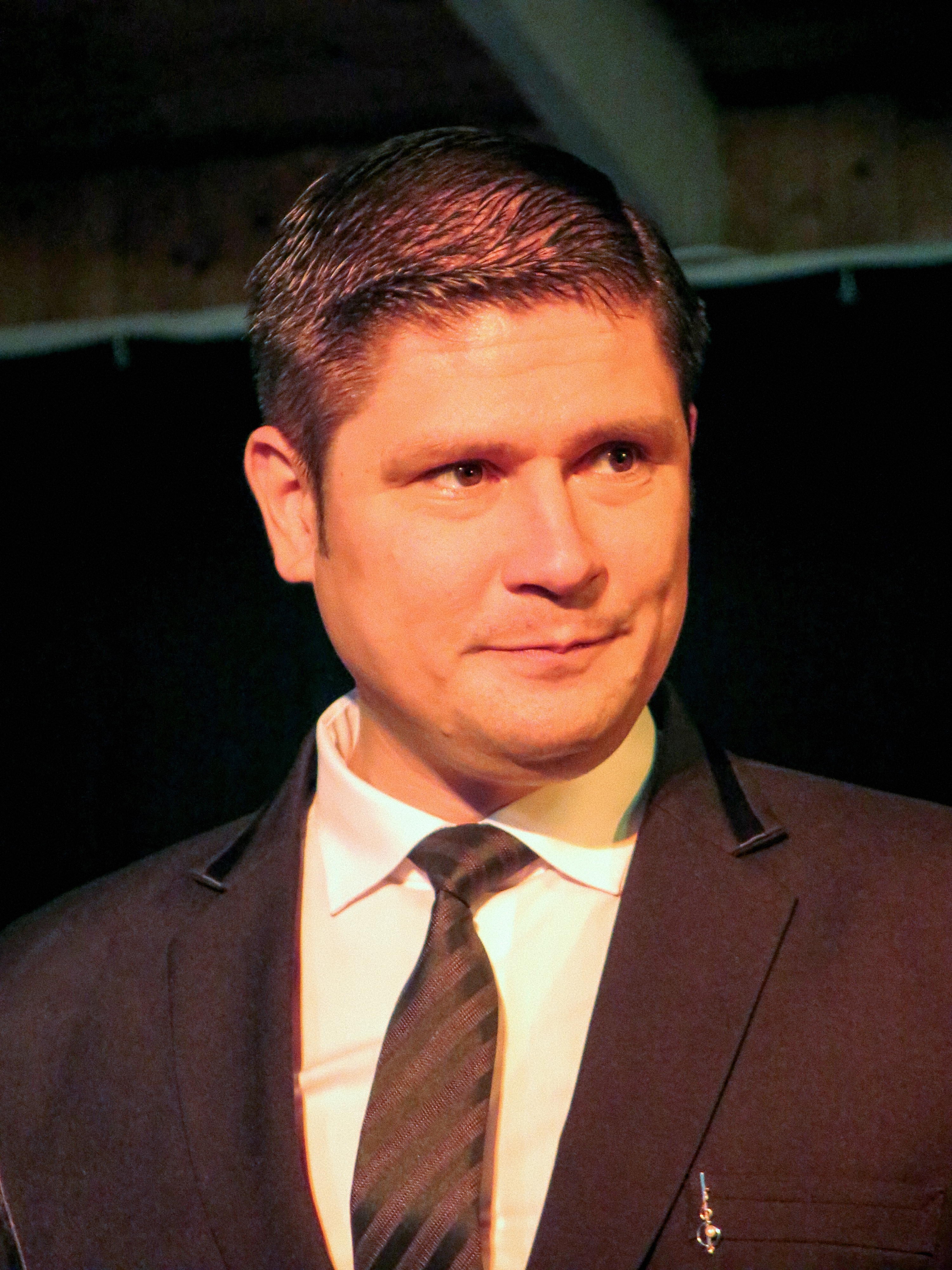 Leif lindeman suomalainen laulaja